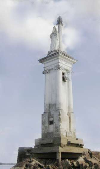 maritime lighthouse